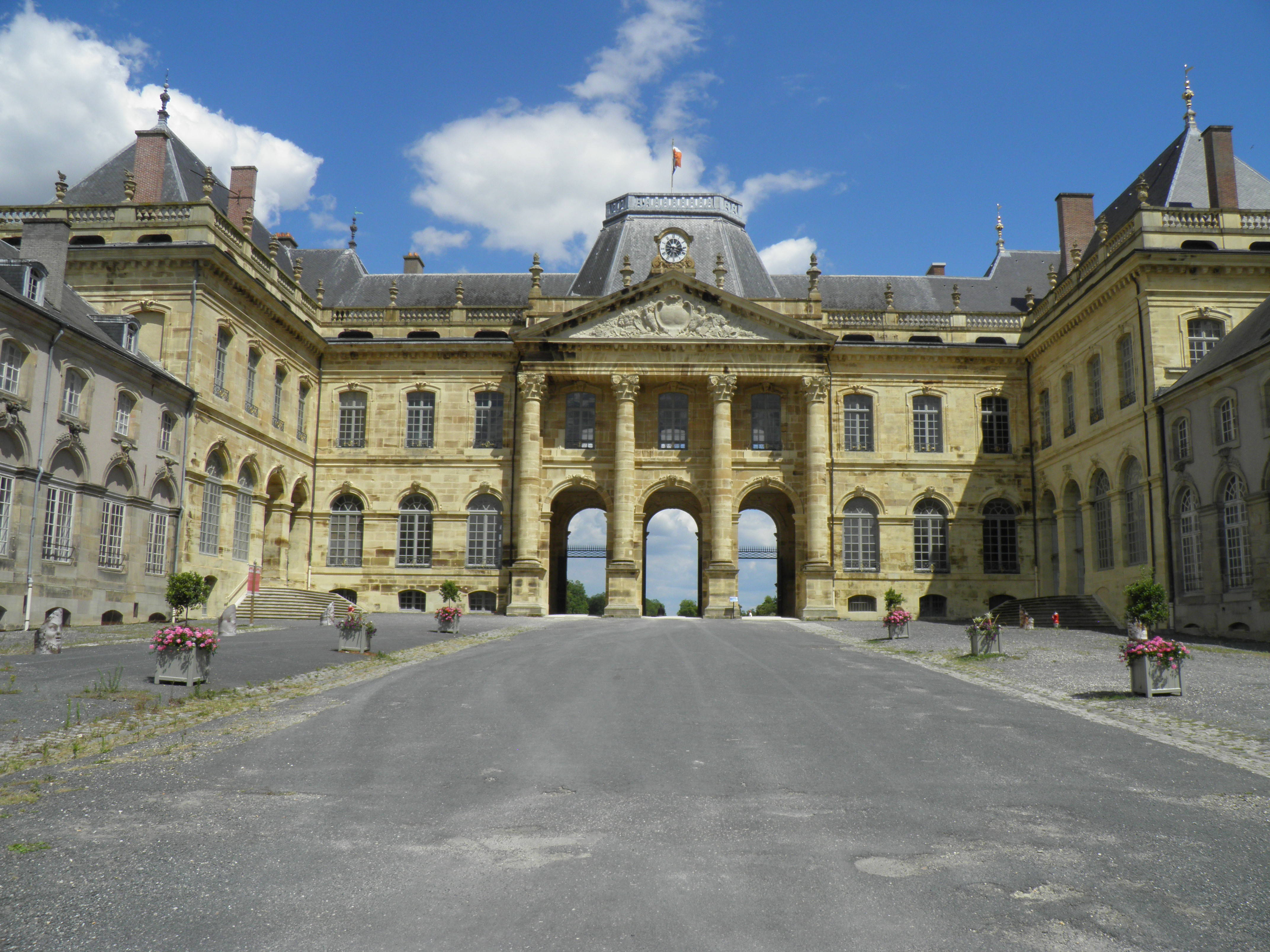 Cour d'honneur du château de Lunéville (Meurthe-et-Moselle, France).